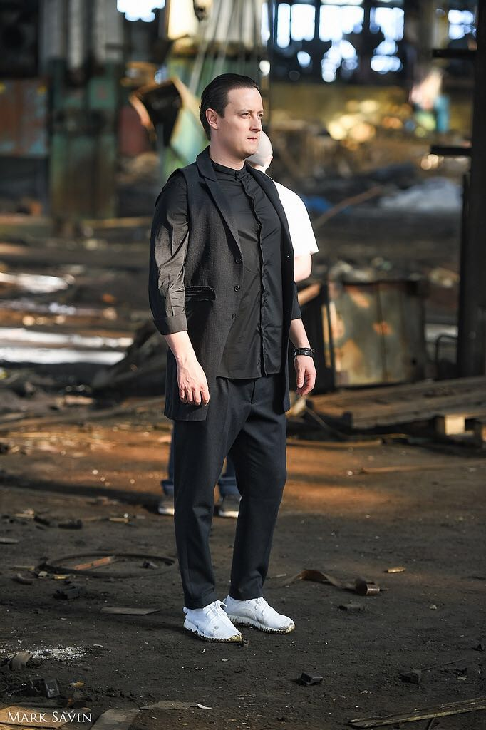 Станислав Ярушин на съемках клипа "Об этом"